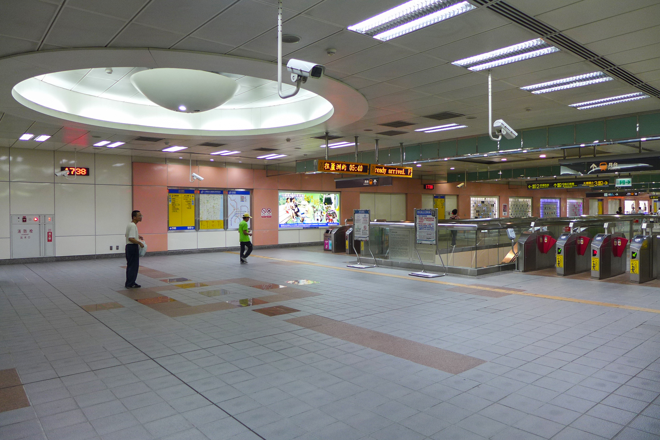 Daqiaotou Station